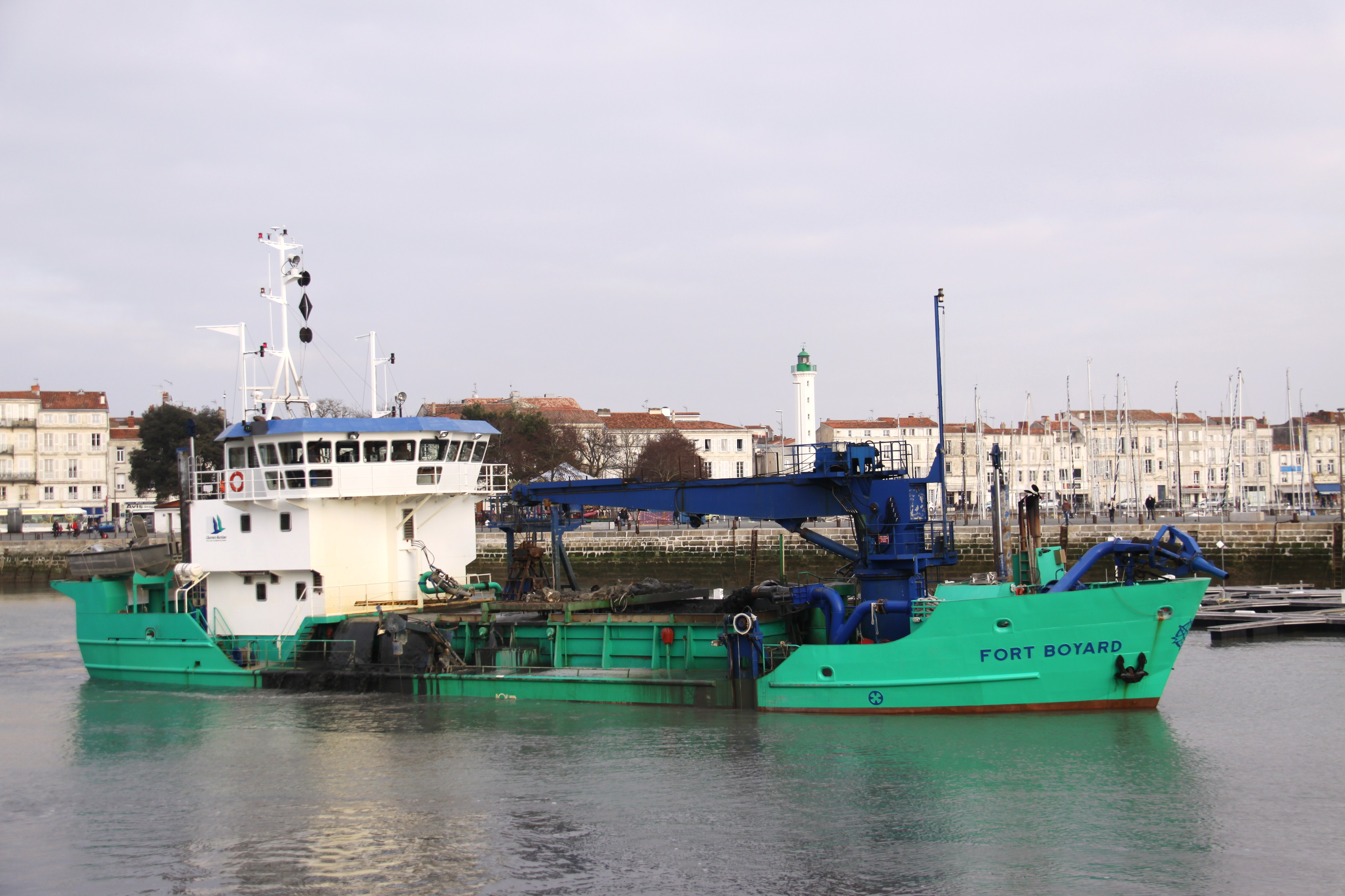 La drague aspiratrice à benne et à clapets "Fort-Boyard" effectuant des travaux de dragage dans le Bassin d' échouage du port de La Rochelle. Ce bateau a été construit en 2002 par le Chantier Merré à Nort-sur-Erdre. Il mesure 41,27 mètres de long et 10,50 mètres de large. Tirant d' eau: 3,16 mètres. La puissance totale de ses deux moteurs est de 634 kw. Sa coque est en métal. Port d' enregistrement: La Rochelle, IMO 9098347. La Rochelle, Charente Maritime, France.